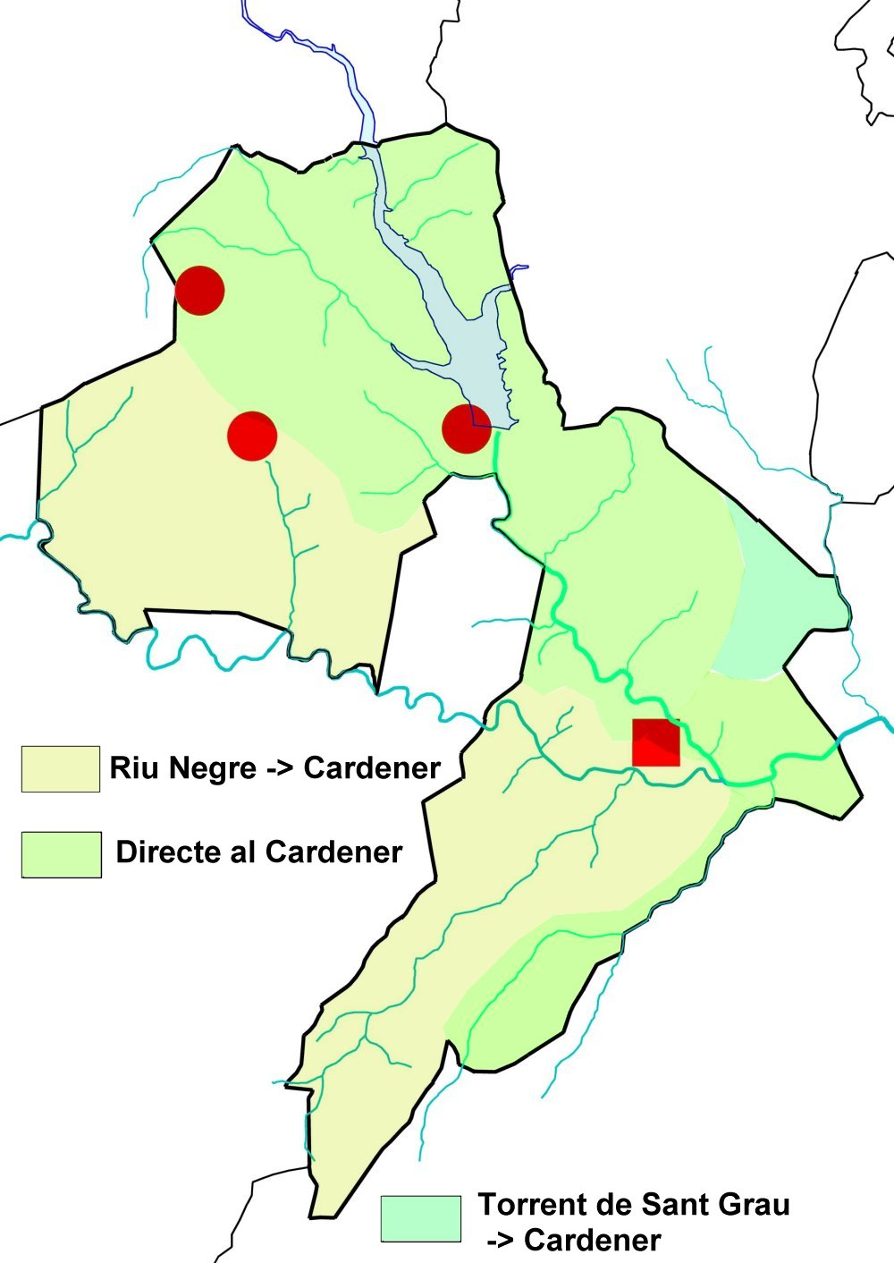 Mapa hidrogràfic del terme municipal de Clariana de Cardener.